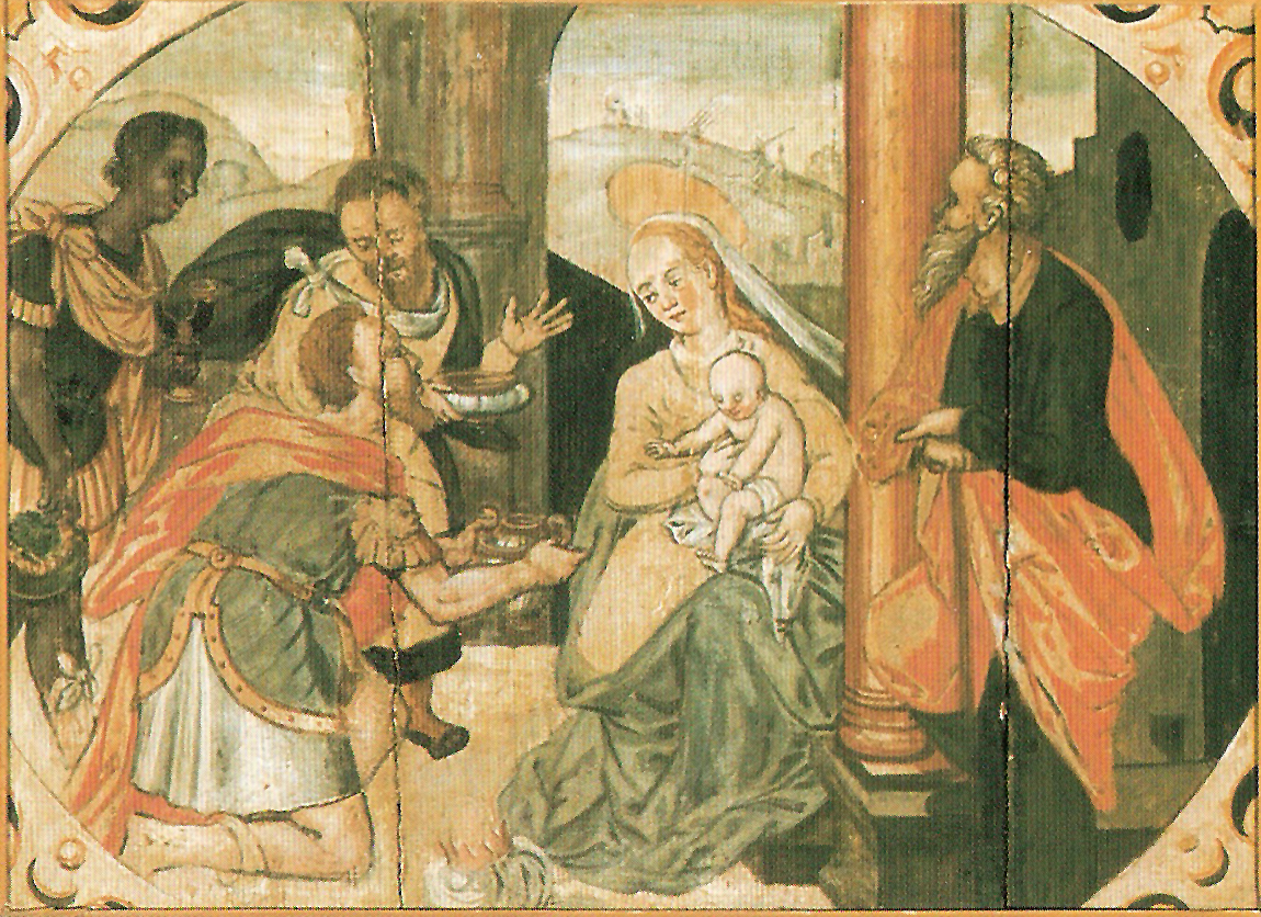 Geburt Jesu 2 (Öl auf Haolz)